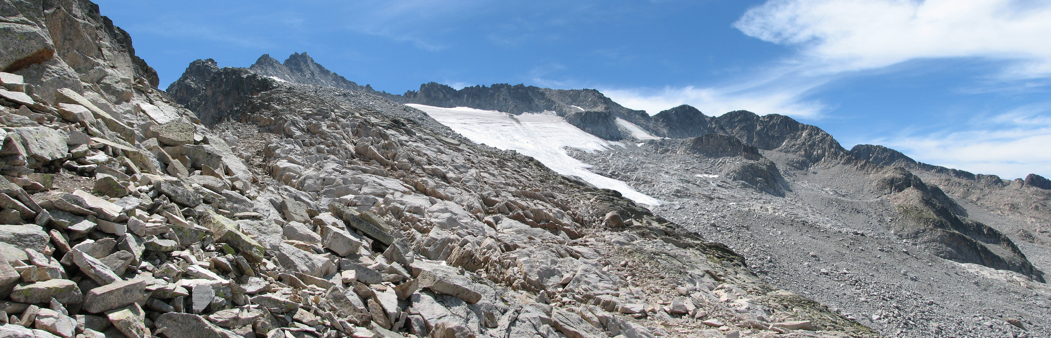 La Madaleta glacier, Spain.. .